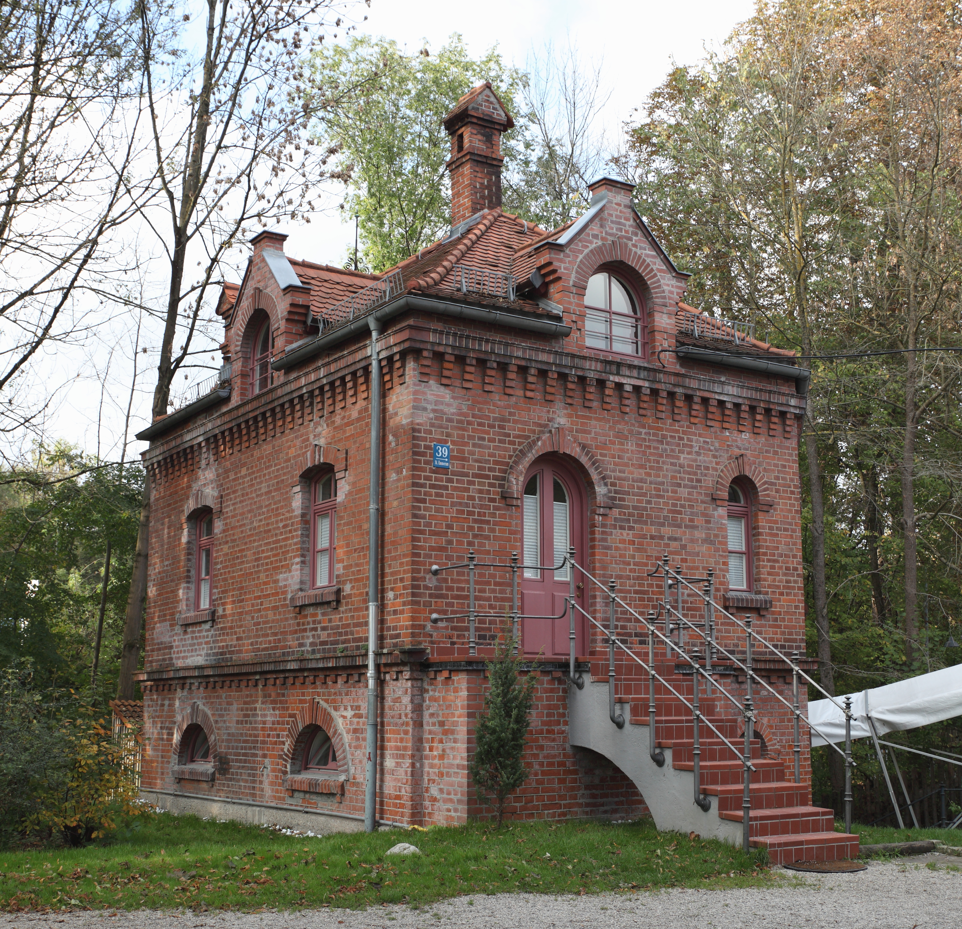 Pumpen- und Floßwärterhäuschen am Ufer des Mittlere-Isar-Kanals, St. Emmeram 39, Oberföhring, München, Deutschland. Von Südost fotografiert. Das Gebäude wird in der Liste der Baudenkmäler in München/Oberföhring geführt.